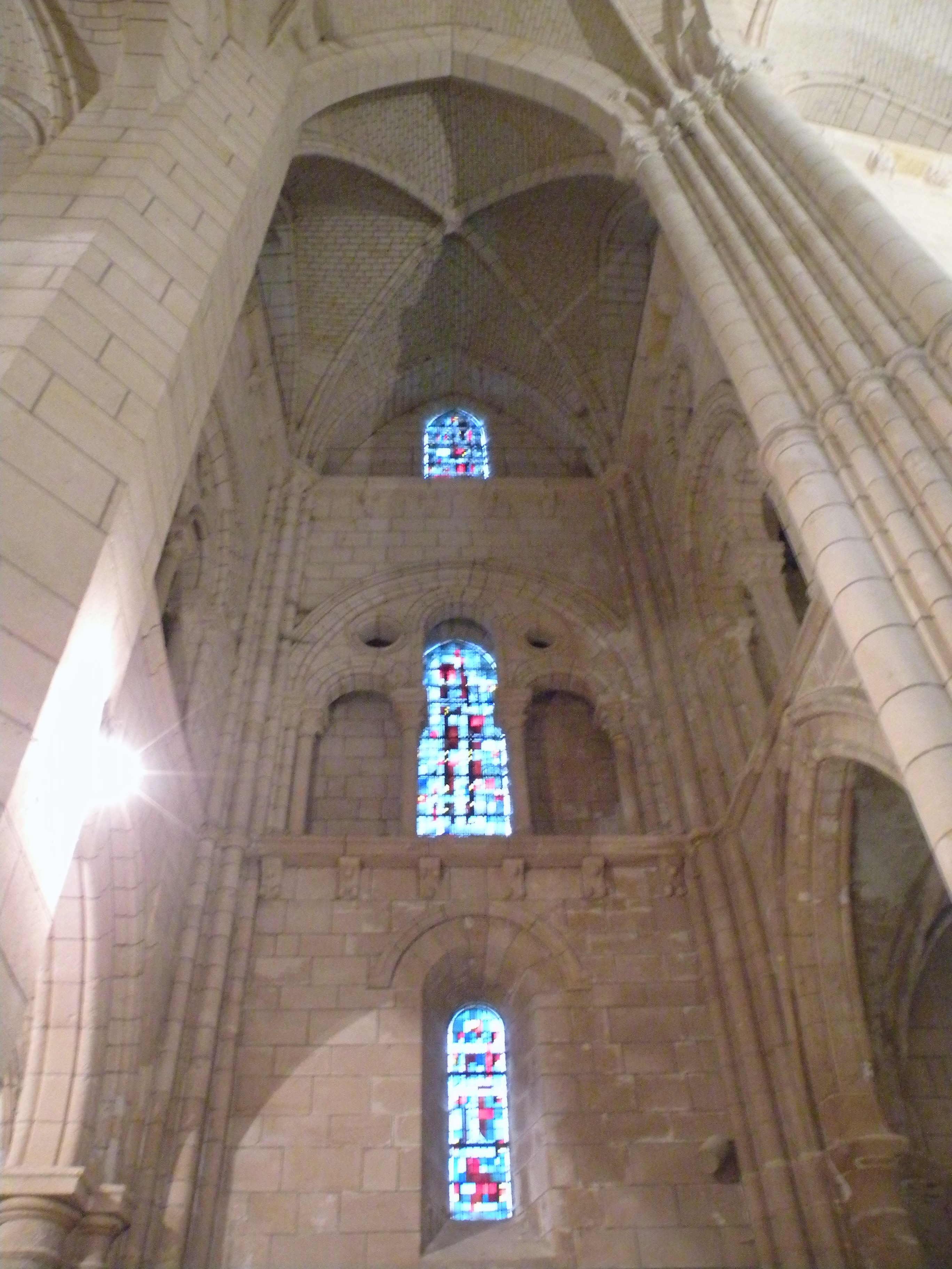 Détail transept : croisillon nord. En haut, l'on voit une galerie de circulation ouverte, ajoutée lors du voûtement au XIIIe siècle. La pile de droite est d'origine, celle de gauche a été rebâtie après l'effondrement du clocher au XVIe siècle.